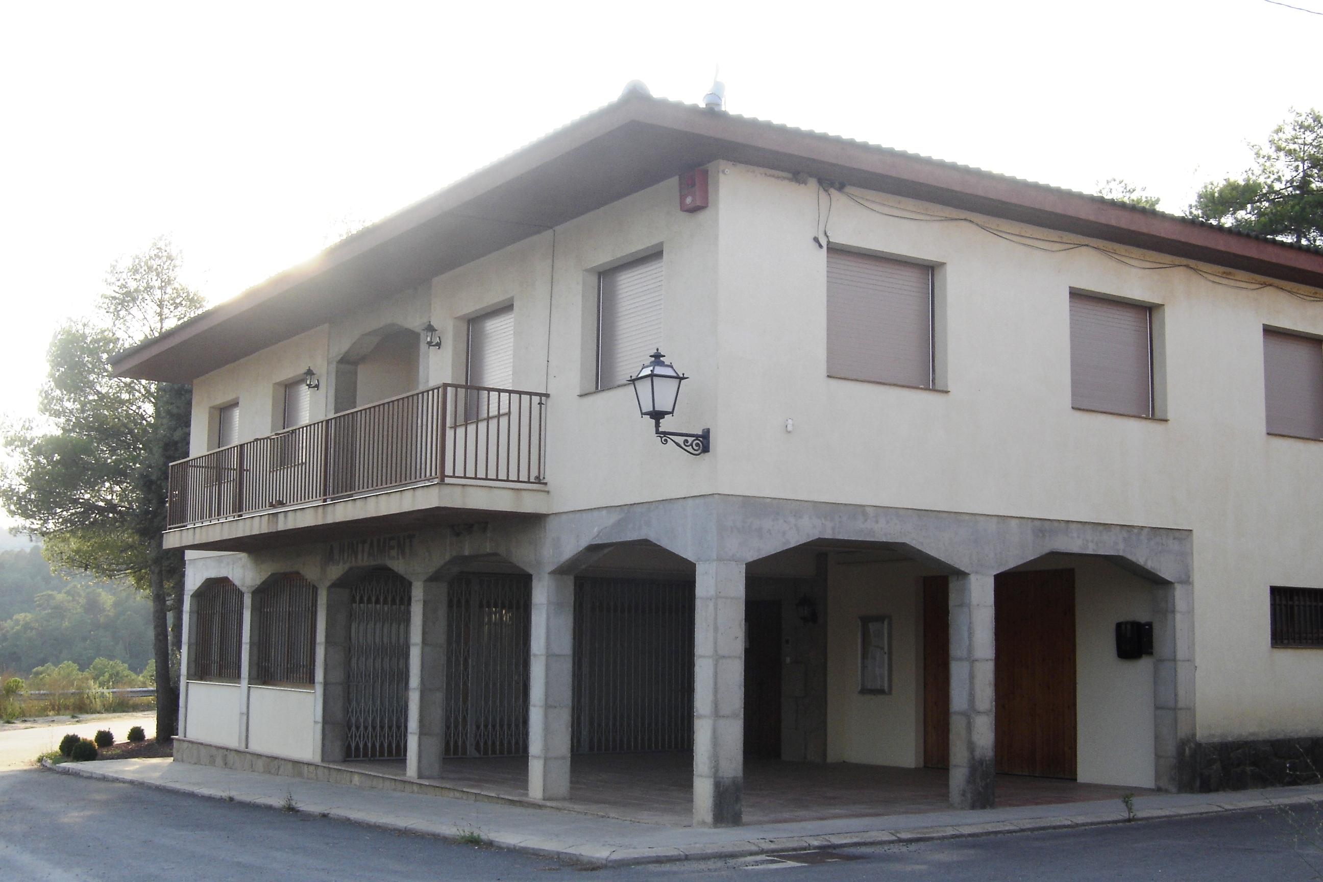 Clariana de Cardener (Solsonès) - L'ajuntament